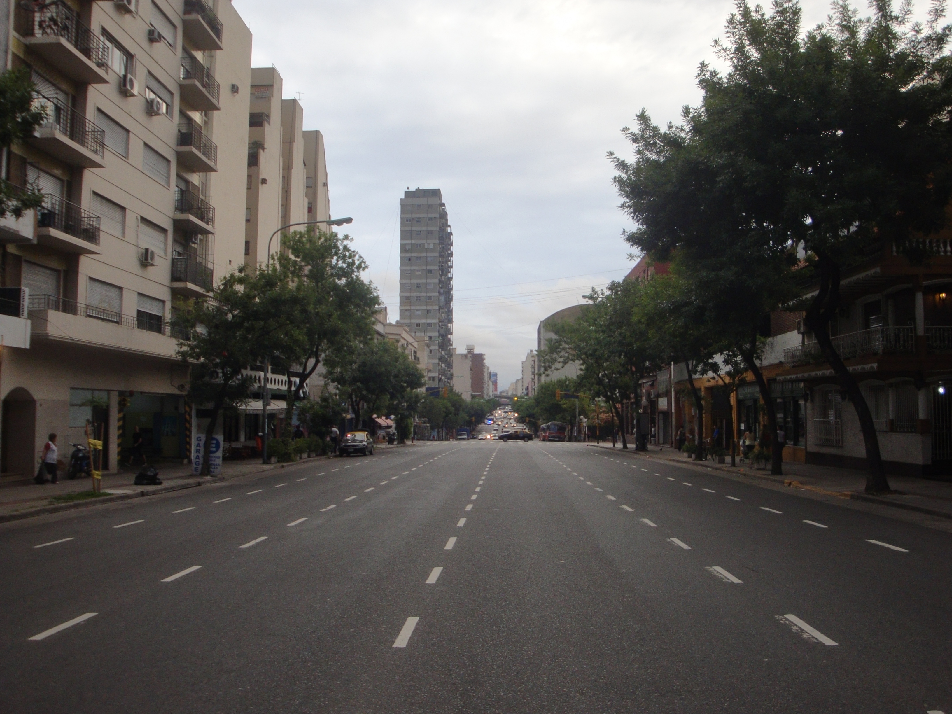 Avenida San Juan, Buenos Aires.